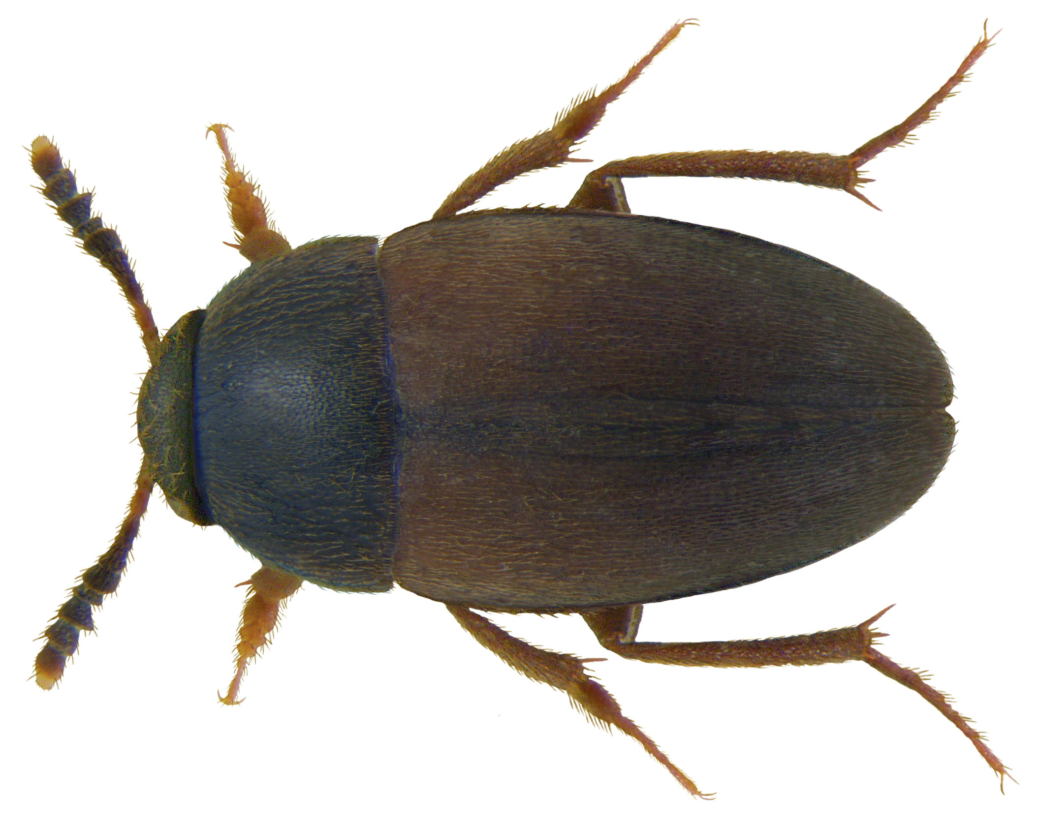 Familie: Cholevidae Grösse: 2,6-3,4 mm Verbreitung: Europa, überall verbreitet Ökologie: vor allem an Kadavern Fundort: Germania, Bayern, Oberfranken, Kulmbach leg.det. U.Schmidt, 1981 Foto: U.Schmidt, 2009